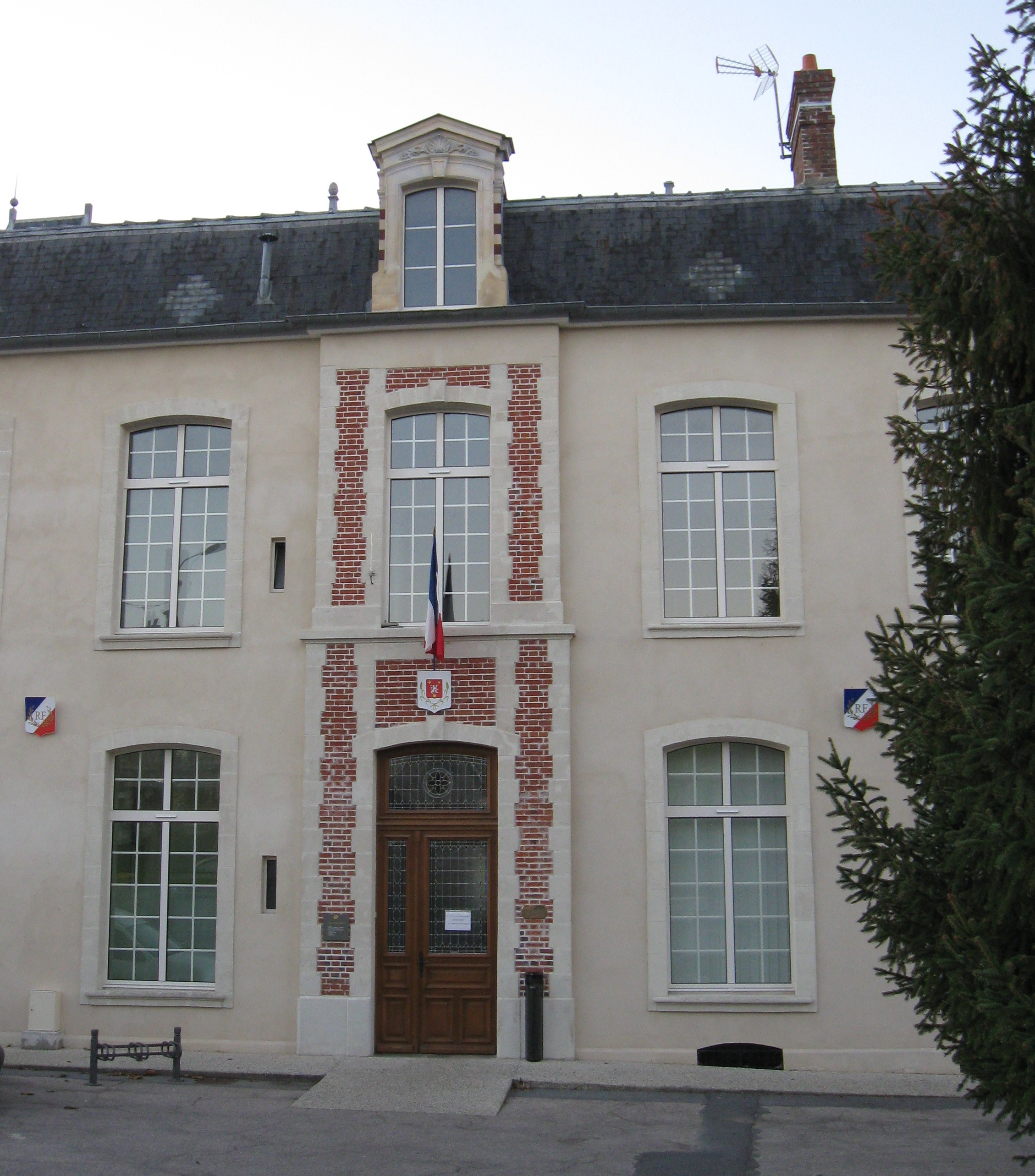 Mairie d'Étampes-sur-Marne. (département de l'Aisne, région Picardie).